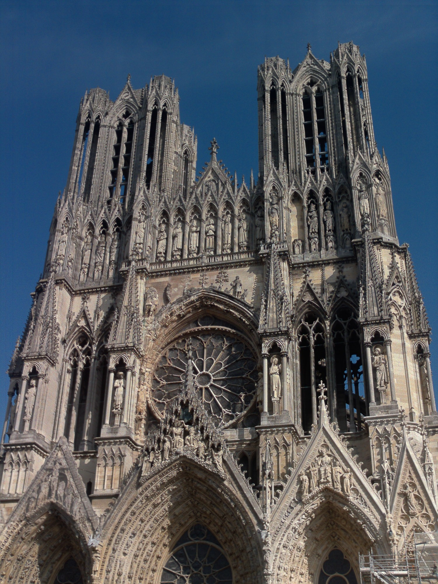 Author : KoS Description : Détails de la cathédrale de Reims taken on October 2005/prise en Octobre 2005